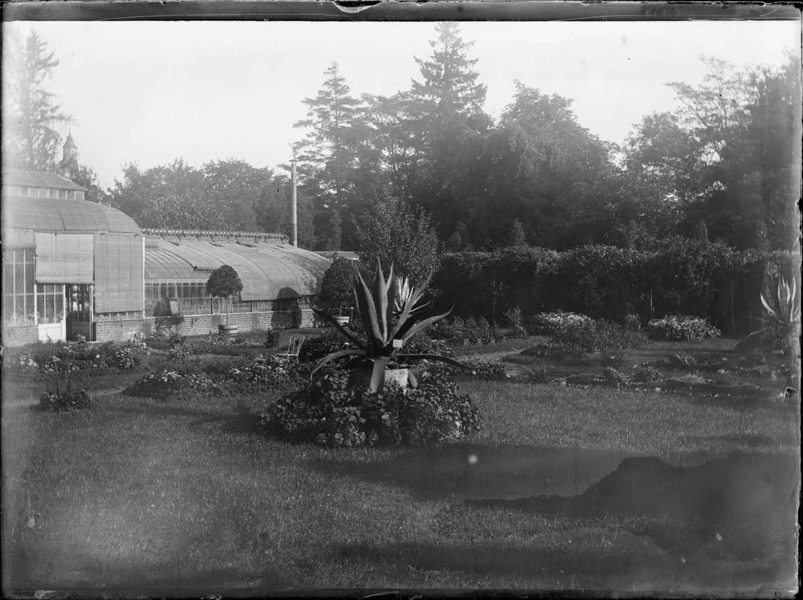 Vue du jardin et des serres de M. Léon van den Bossche à Tirlemont (Hortus thenensis) - Émile De Wildeman. (Collection de l'État fédéral belge, en dépôt au Jardin botanique de Meise)